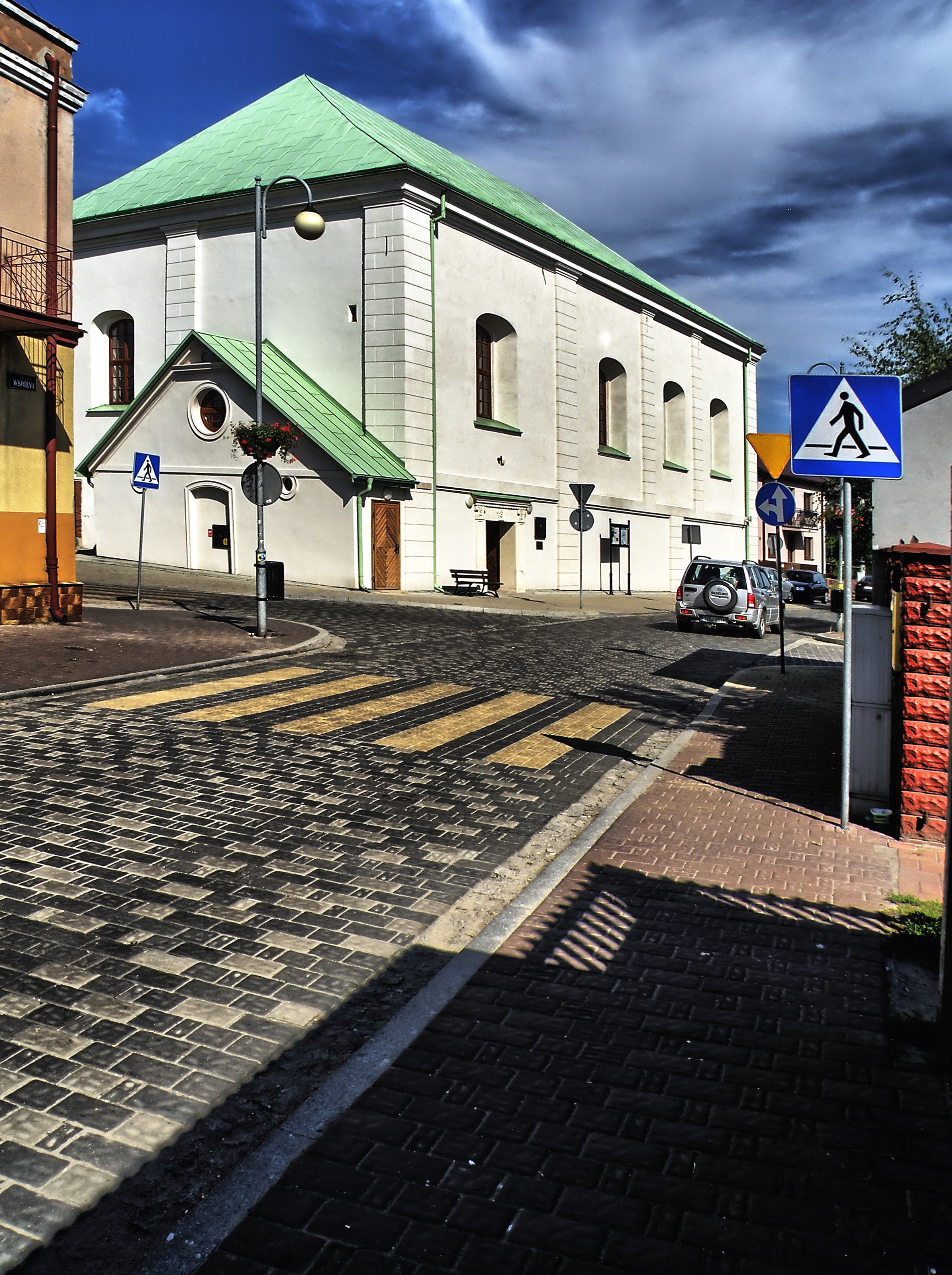 Chmielnik, synagoga, obecnie nieużytkowana, 1630, 1942 r.